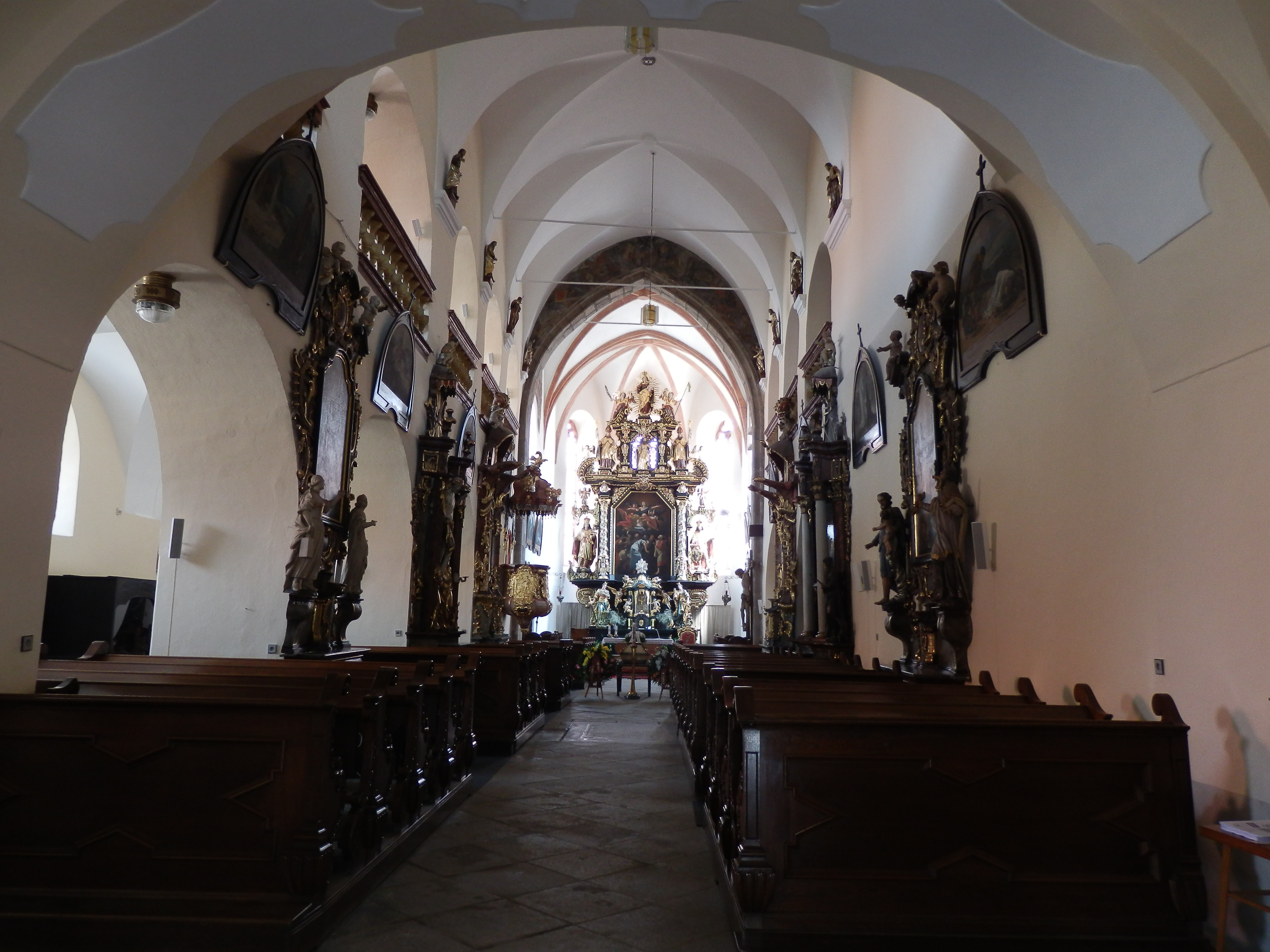 Kostel sv. Bartoloměje (Pelhřimov), Děkanská, Pelhřimov